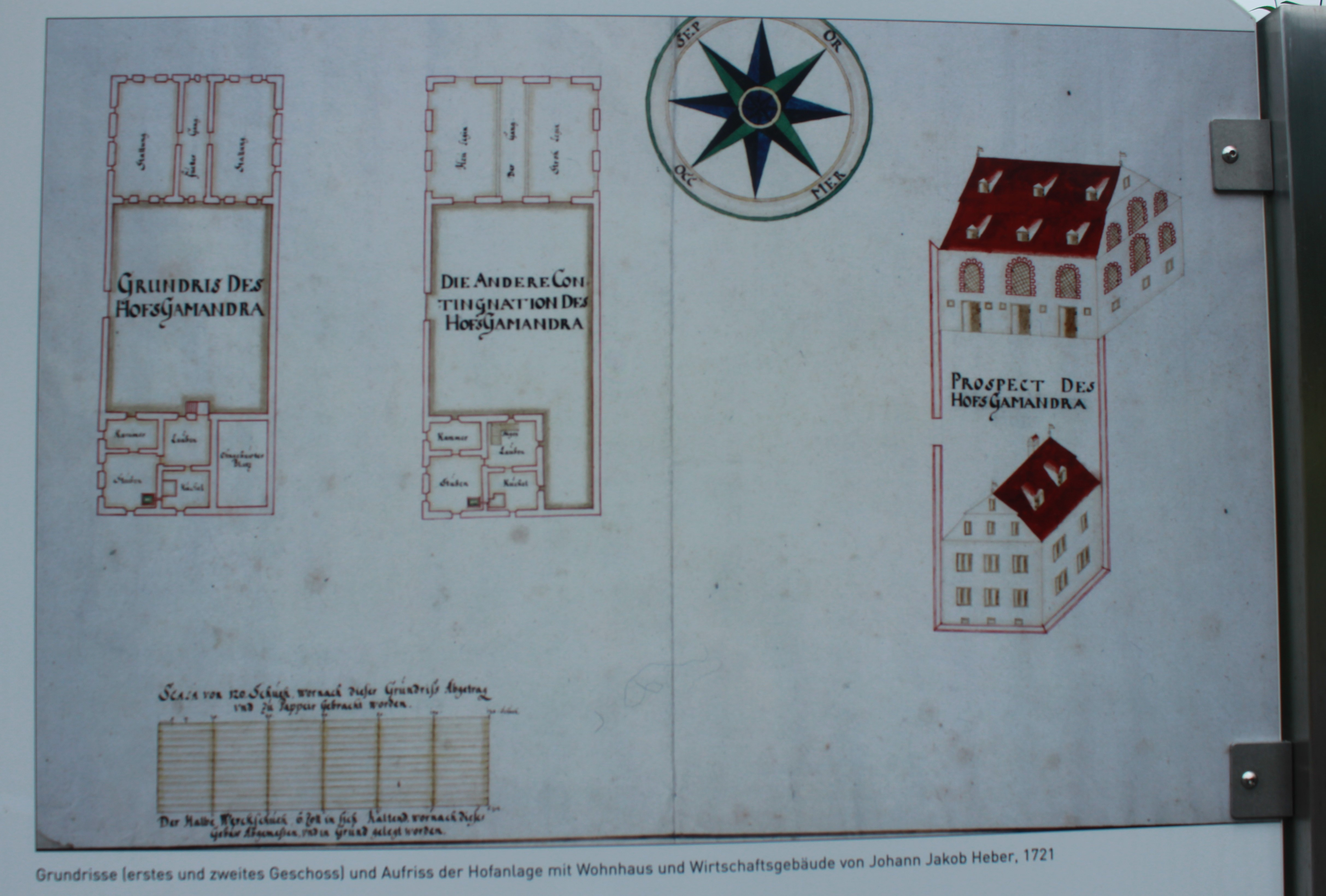 Der Bauplan von Johann Jacob Heber aus dem Jahr 1721 zeigt Grundriss und Aufriss der beiden Gebäude auf dem Gamanderhof.